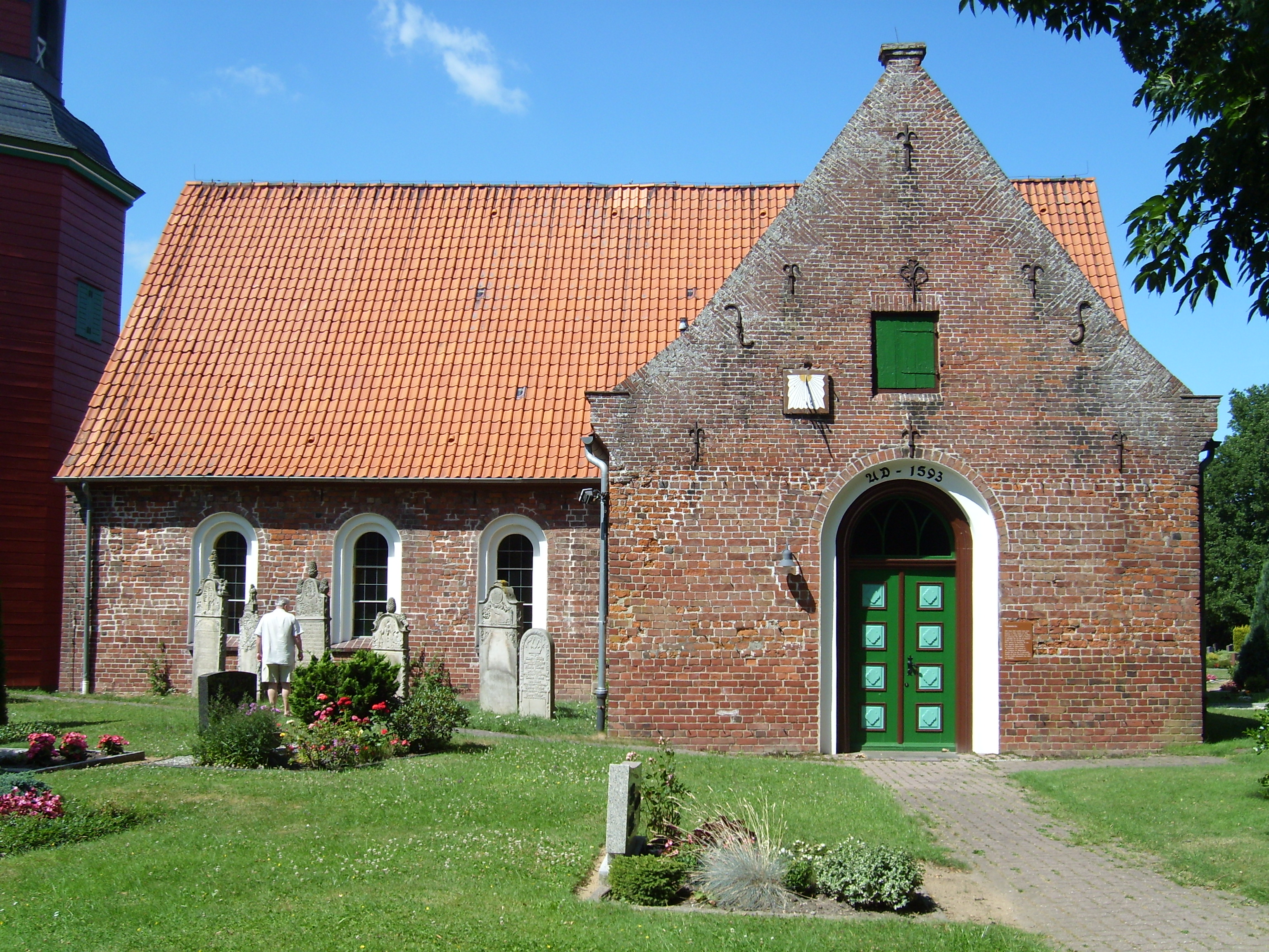 Trinitatiskirche Wewelsfleth